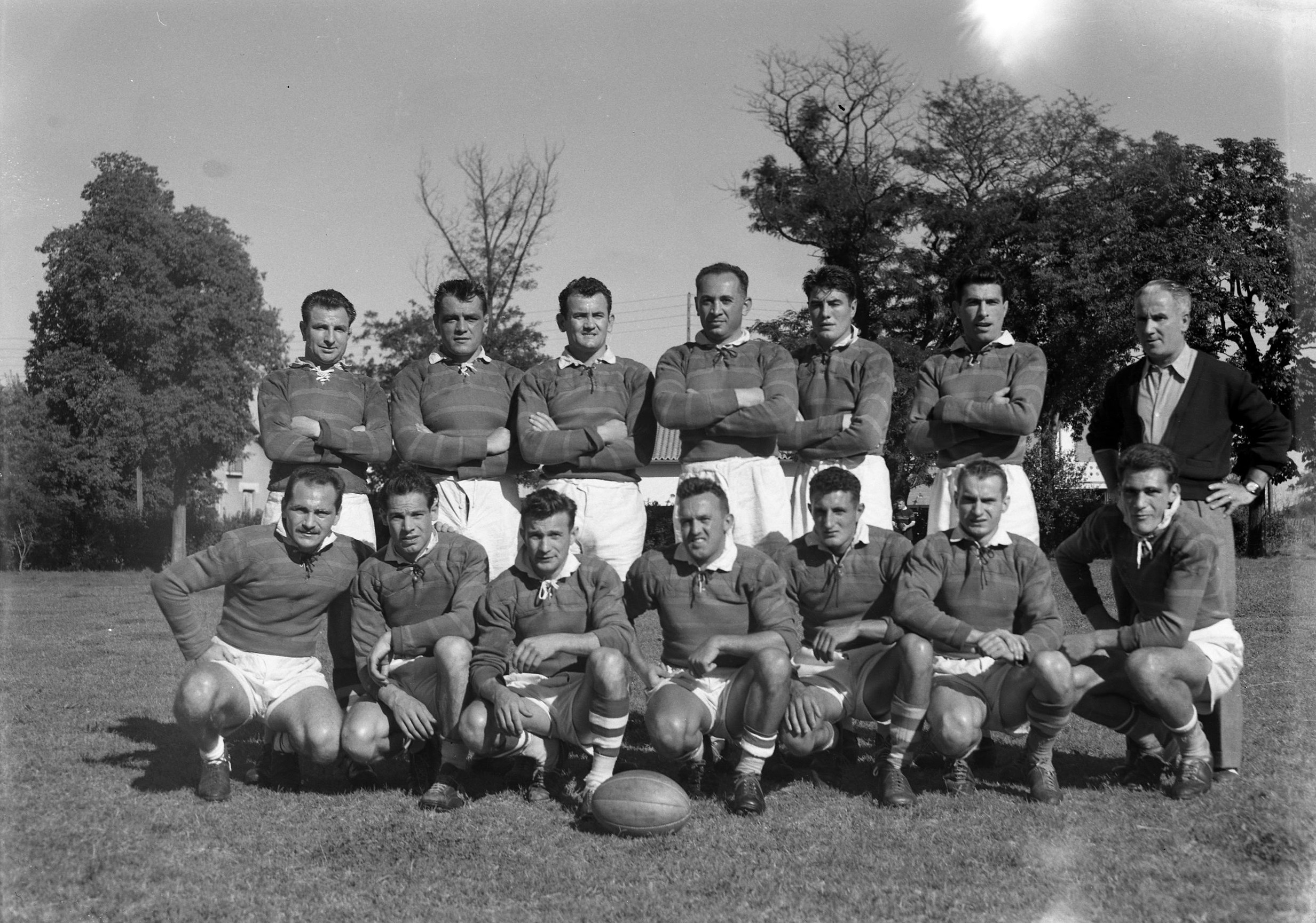 8 septembre 1954. Photo de groupe de l'équipe Toulouse Olympique XIII (rugby à XIII) avec l'entraîneur ; le groupe pose en plein air. 1ère rangée, à gauche, Vincent Cantoni.